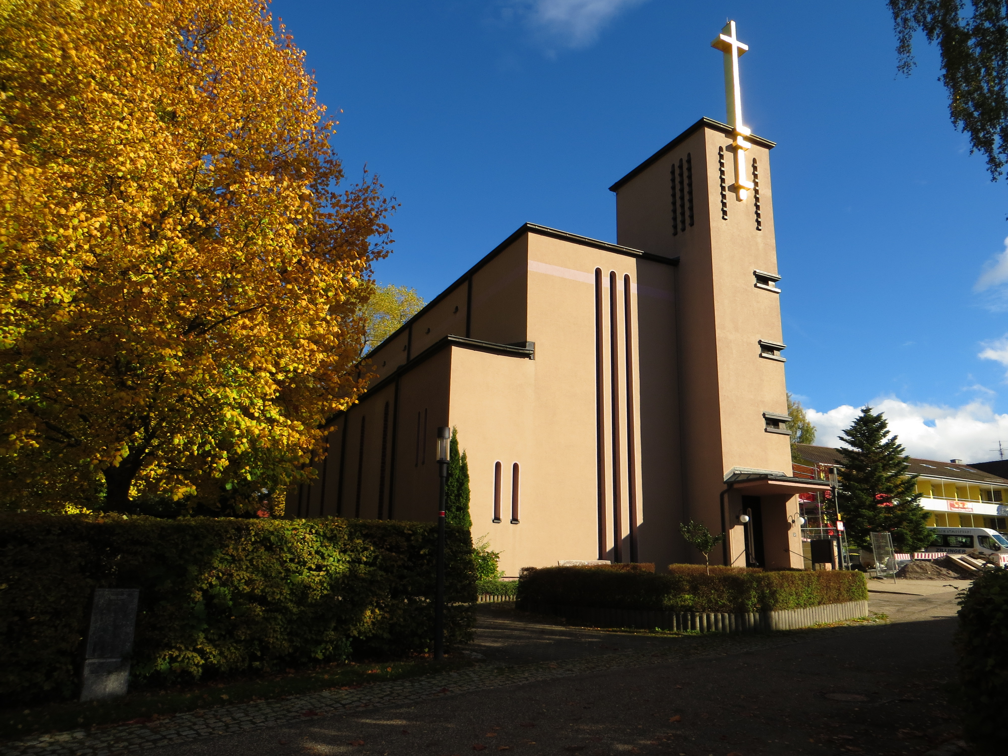 Blick auf die Katholische Kirche in Schömberg im Kreis Calw